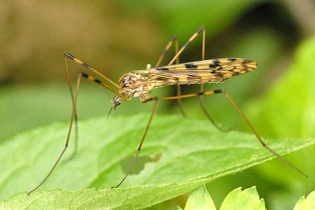 Metalimnobia quadrimaculata from Commanster, Belgian High Ardennes .